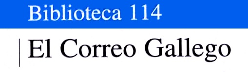 Biblioteca 114